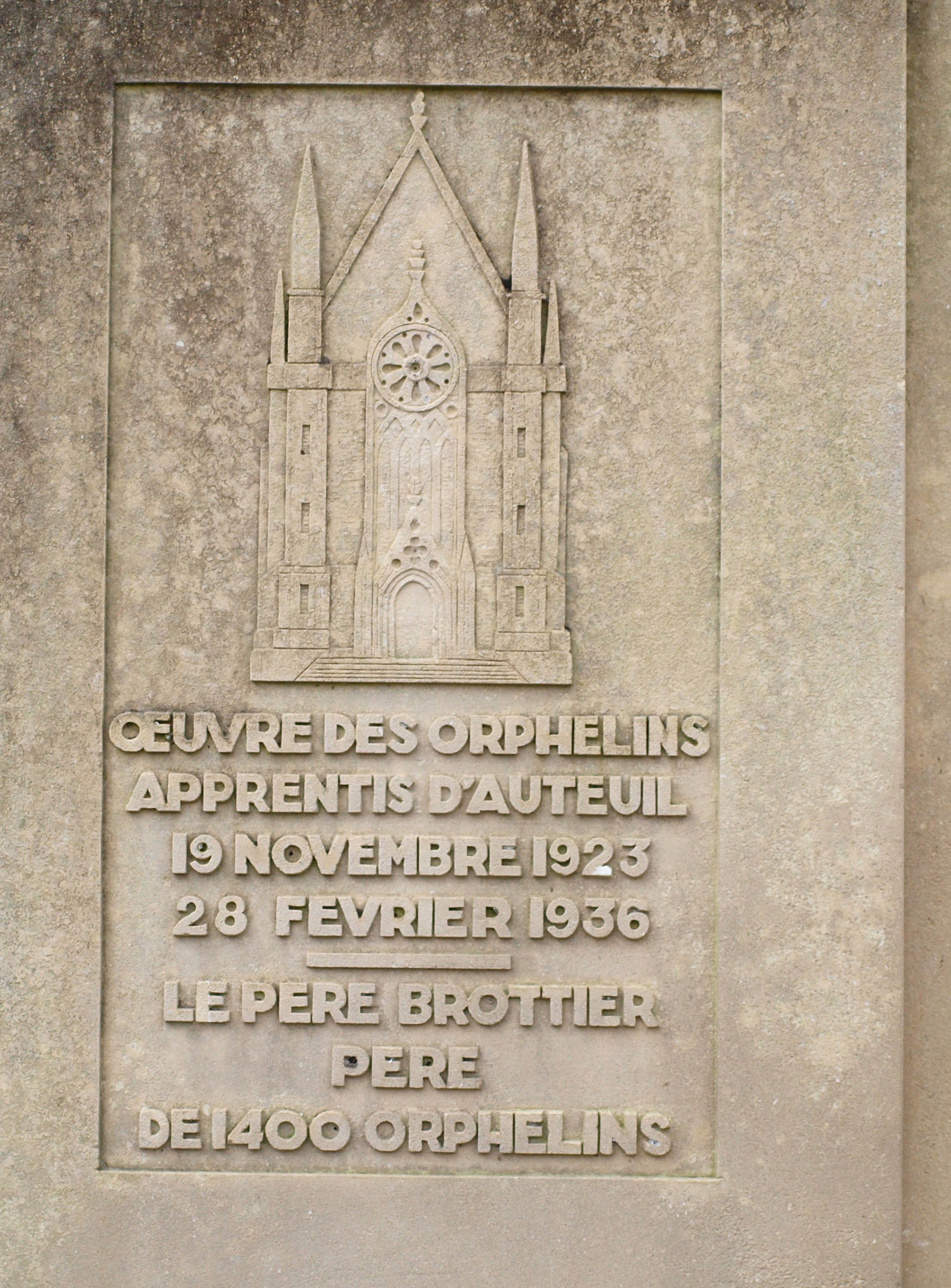 La Ferté-Saint-Cyr (Loir-et-Cher, France) ; statue de Daniel Brottier